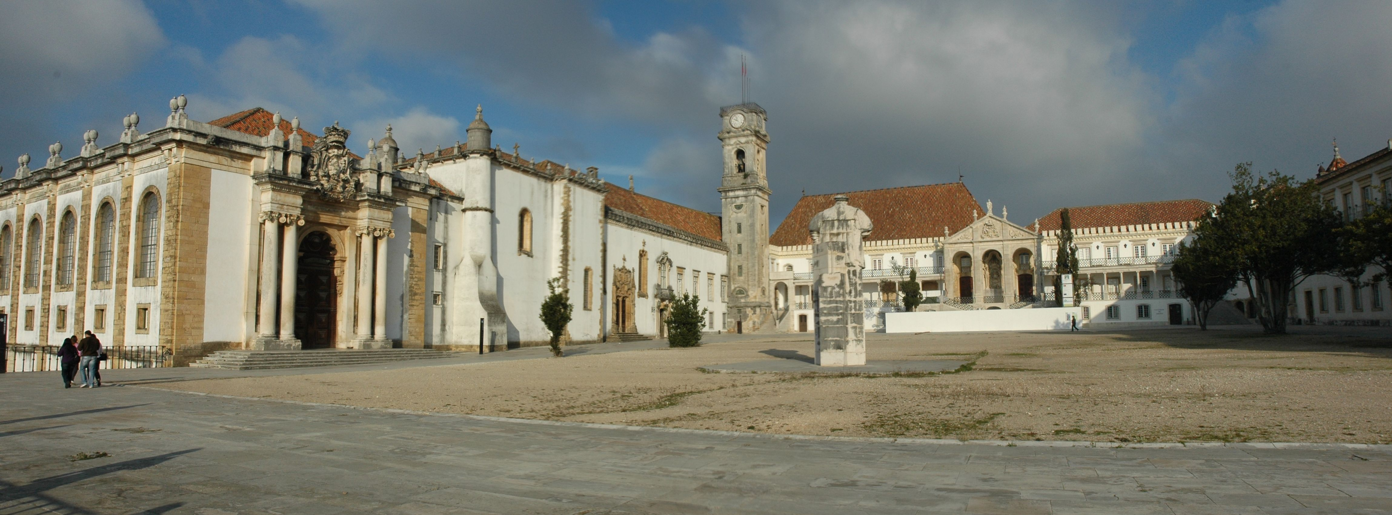 Universitat de Coïmbra